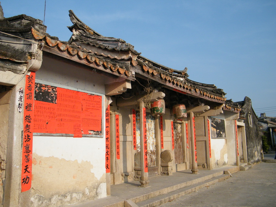 茂洲两座萧氏祖祠其中的一座。